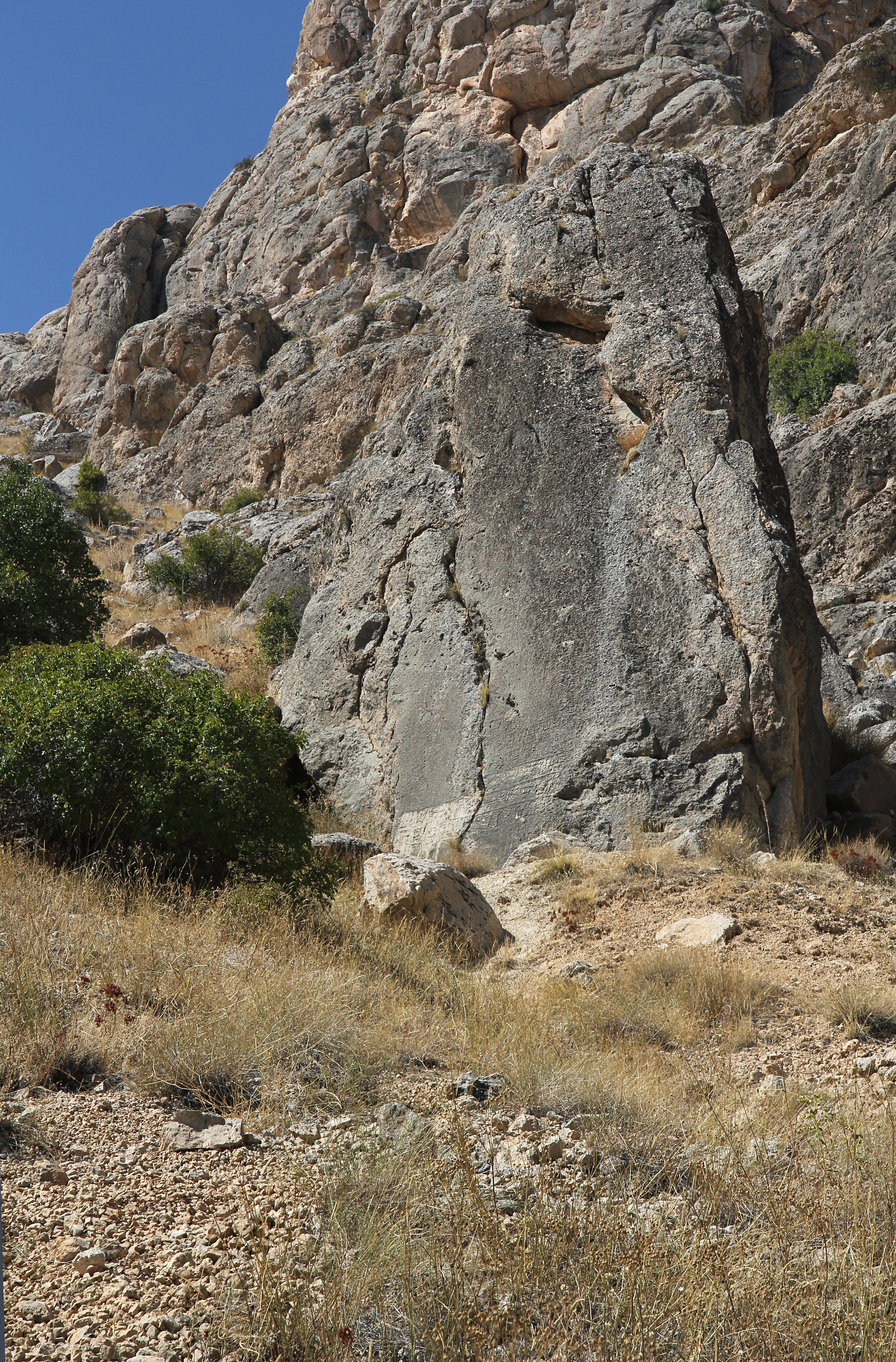 Luwische Felsinschriften von Gürün, Zentraltürkei, Obere Inschrift "Gürün B"